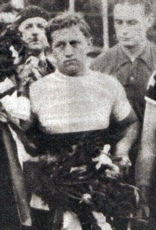 Edgar Buchwalder, suisse champion du monde sur route amateurs, le 6 septembre 1936 (Berne).